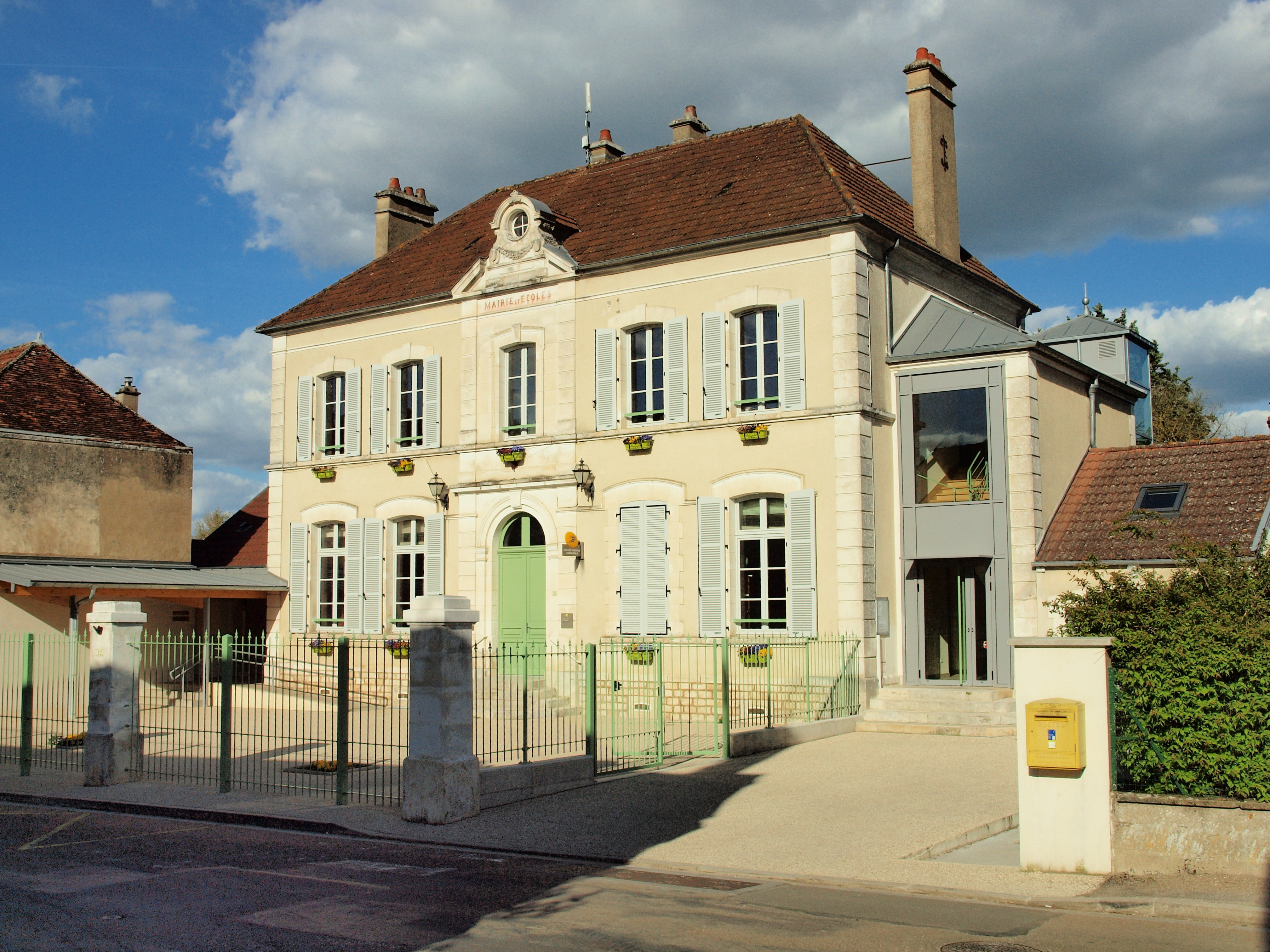 Val-de-Mercy (Yonne, France)